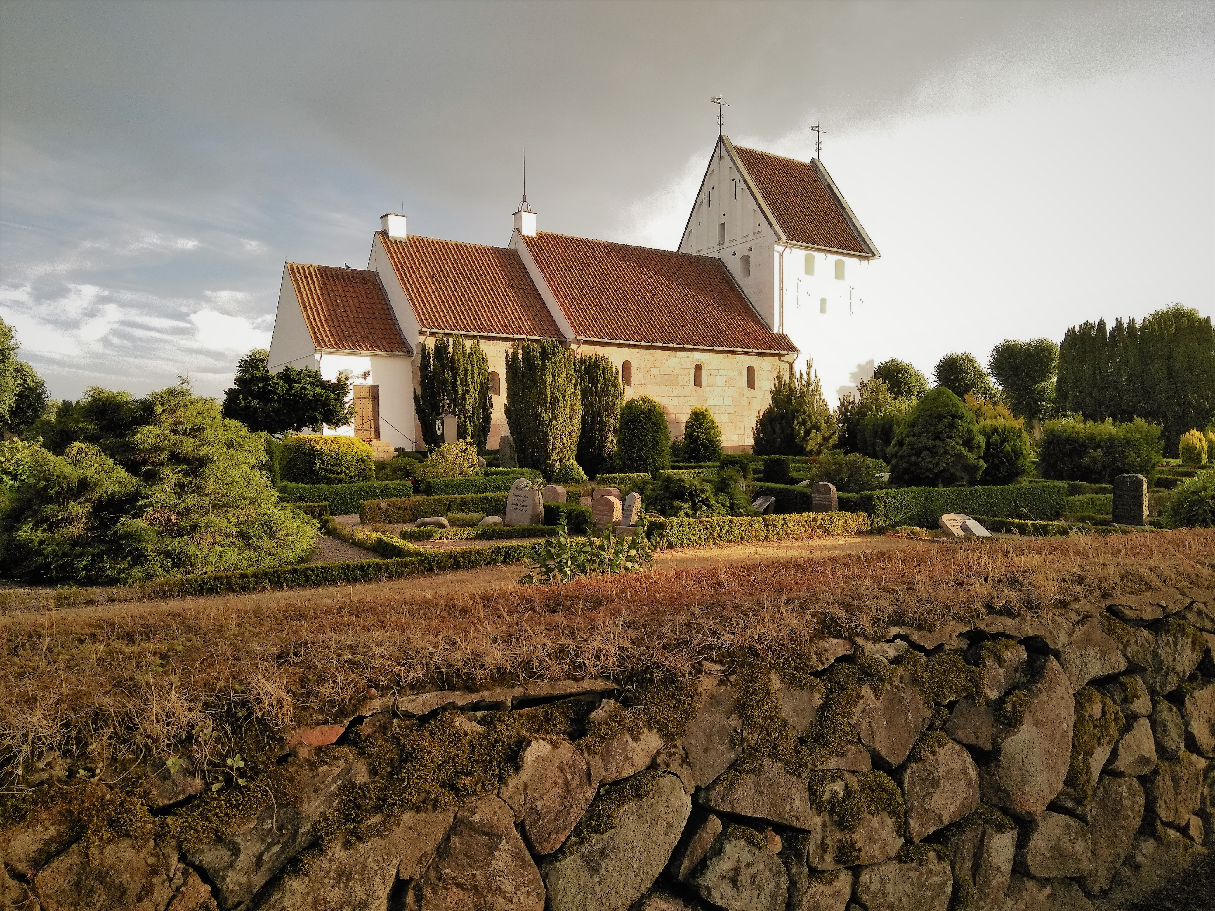 Vaade kirikule kirdest, Skovbølingu küla poolt.